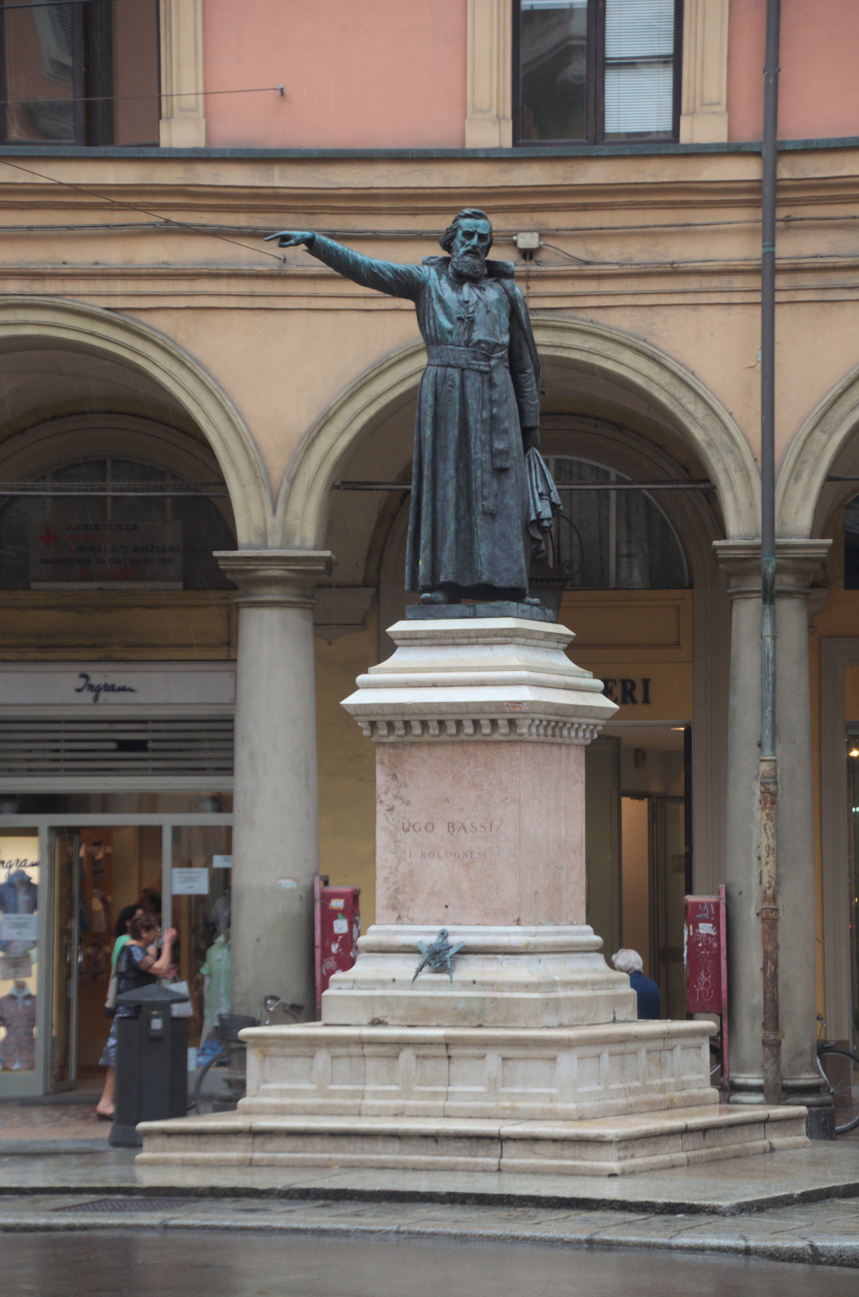 statue d'Ugo Bassi sur laquelle est écrit : « A Ugo Bassi a bolognesi » (à Ugo Bassi, un Bolonais), sur la Via Ugo Bassi, à Bologne, Émilie-Romagne, Italie